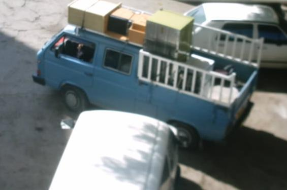 אלטעזחן מודרני בפ"ת.